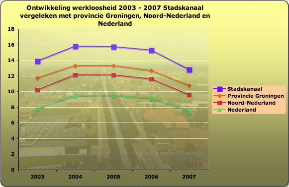 Werkloosheid in Stadskanaal in de periode 2003 t/m 2007 vergeleken met prov. Groningen, Noord-Nederland en Nederland